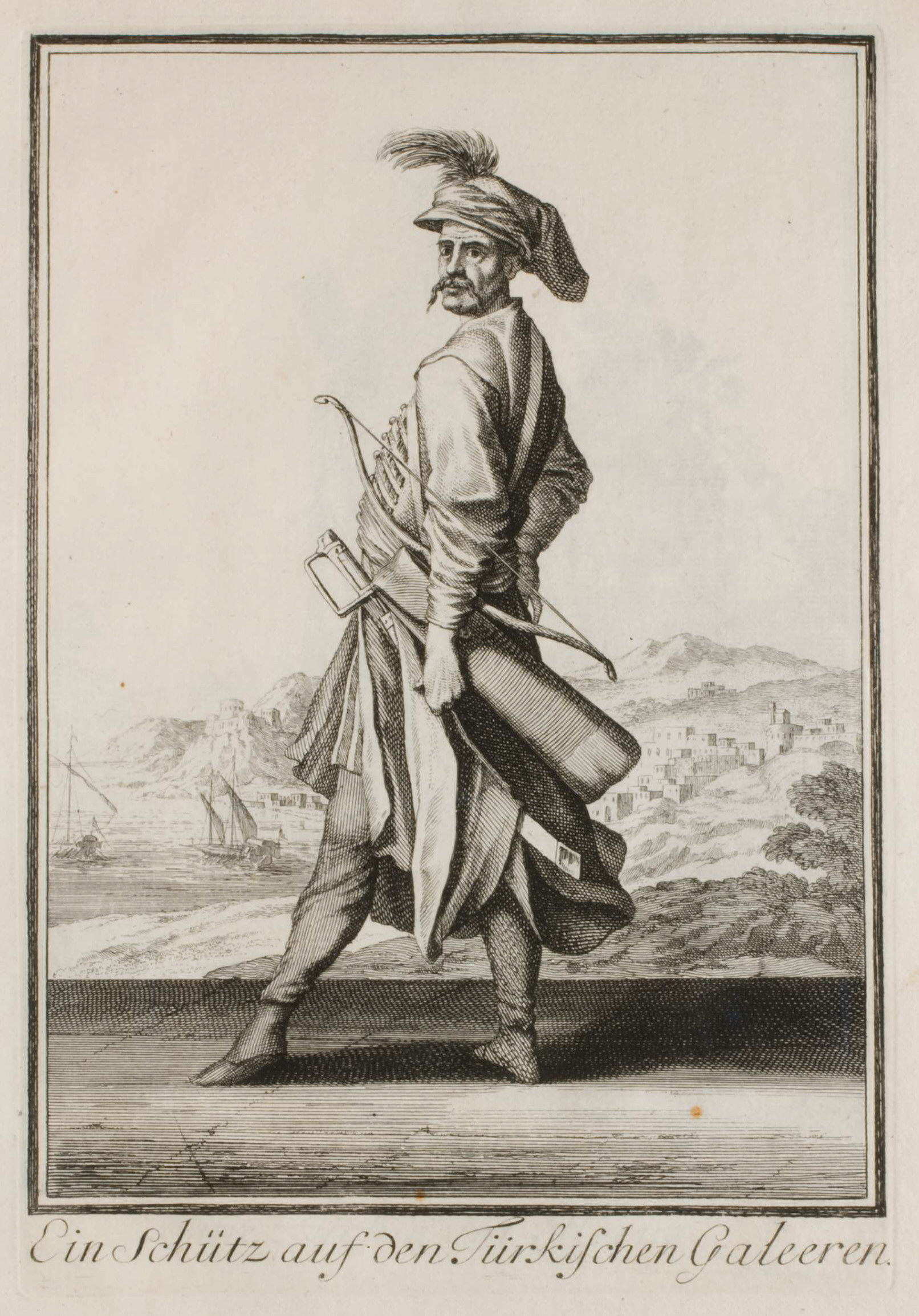 Neu-eröffnete Welt-Galleria. ..., Nürnberg 1703. 86. Ein Schütz auf den Türkischen Galeeren.